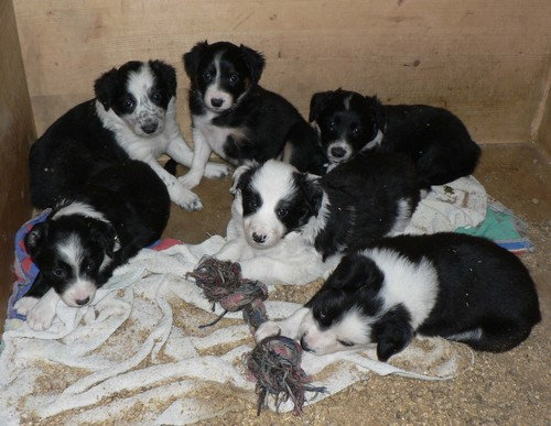 Szczenięta rasy Border Collie